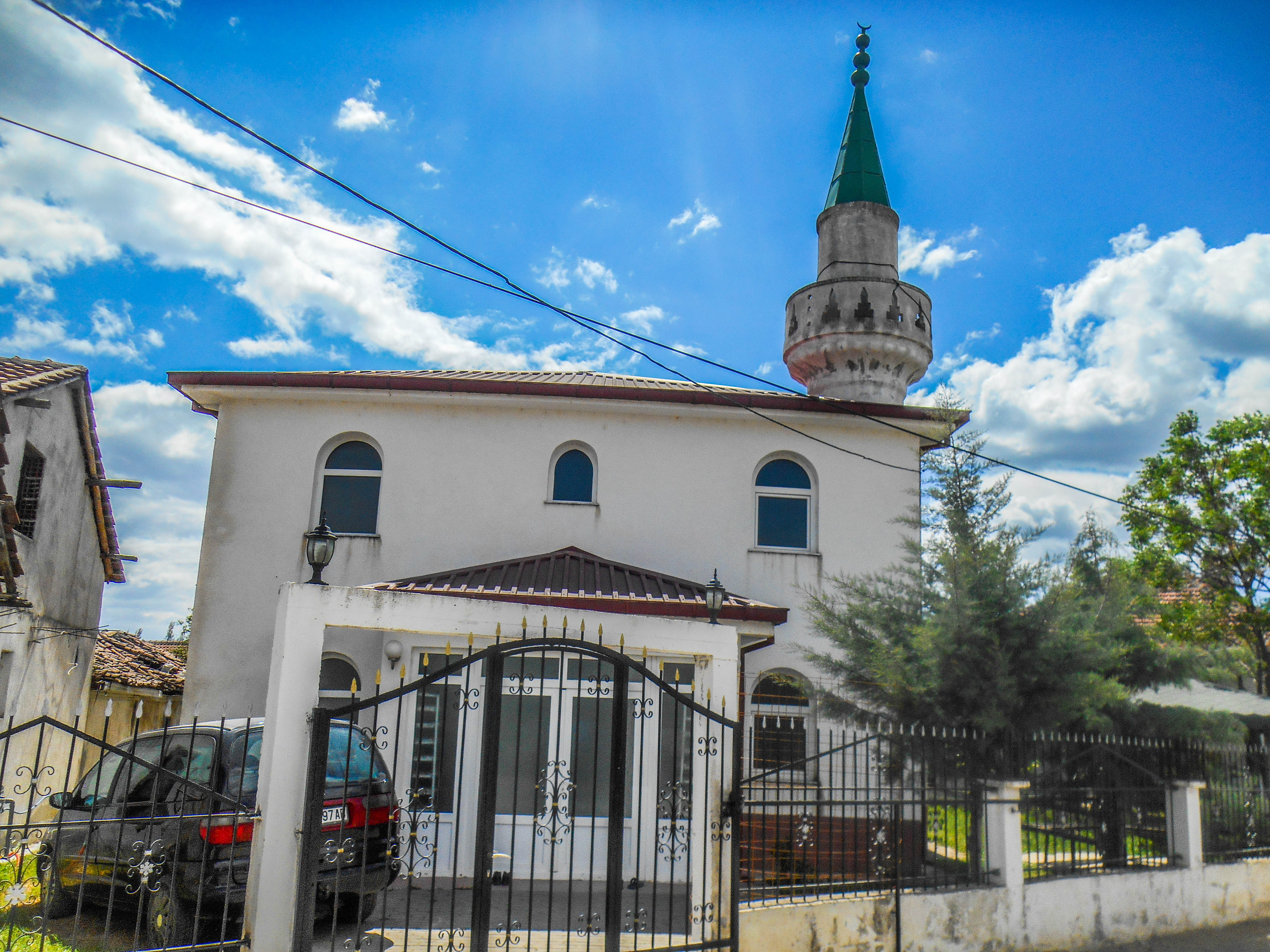 Џамија во Градошорци